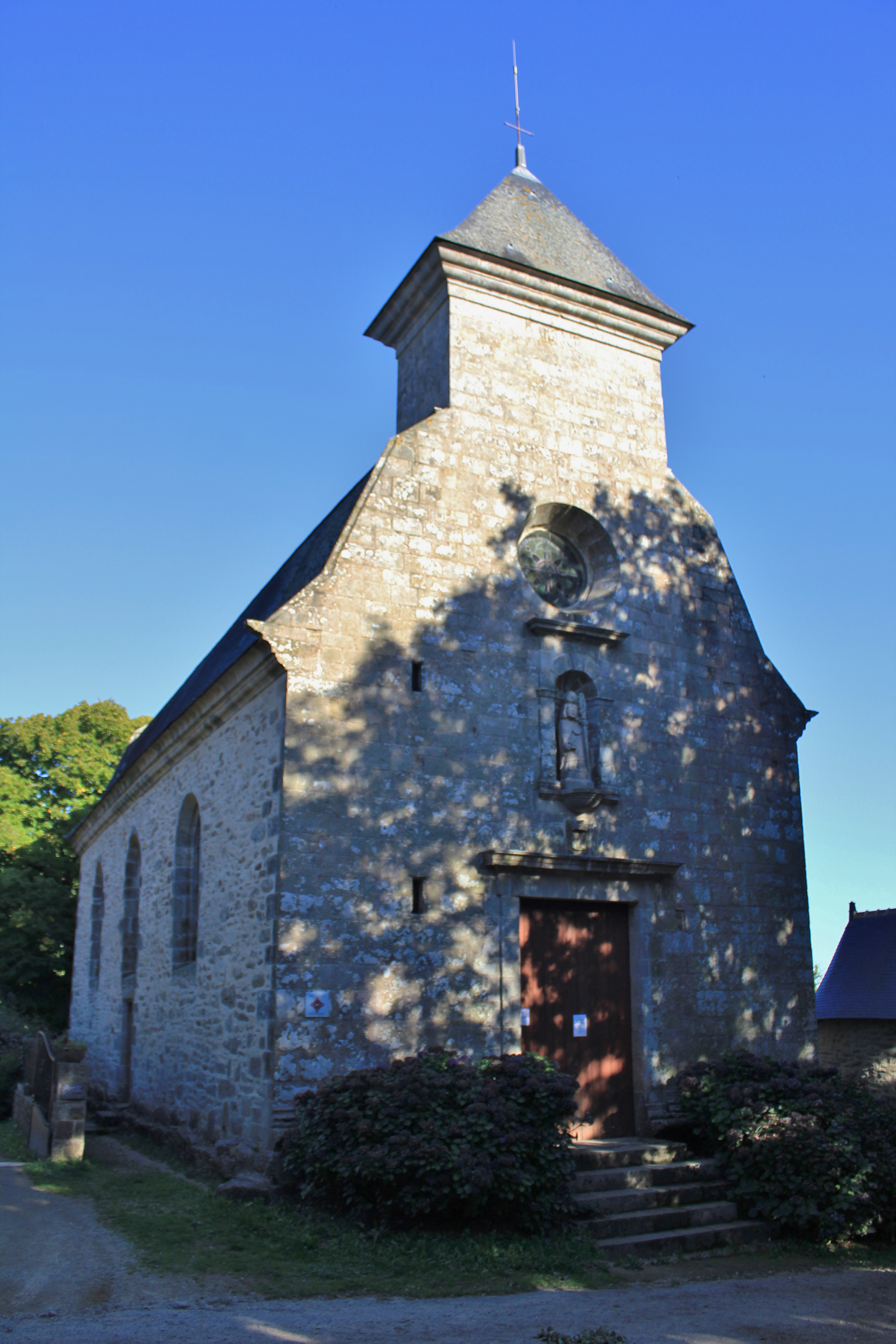 Chapelle Saint-Quirin (Brech) : vue générale .